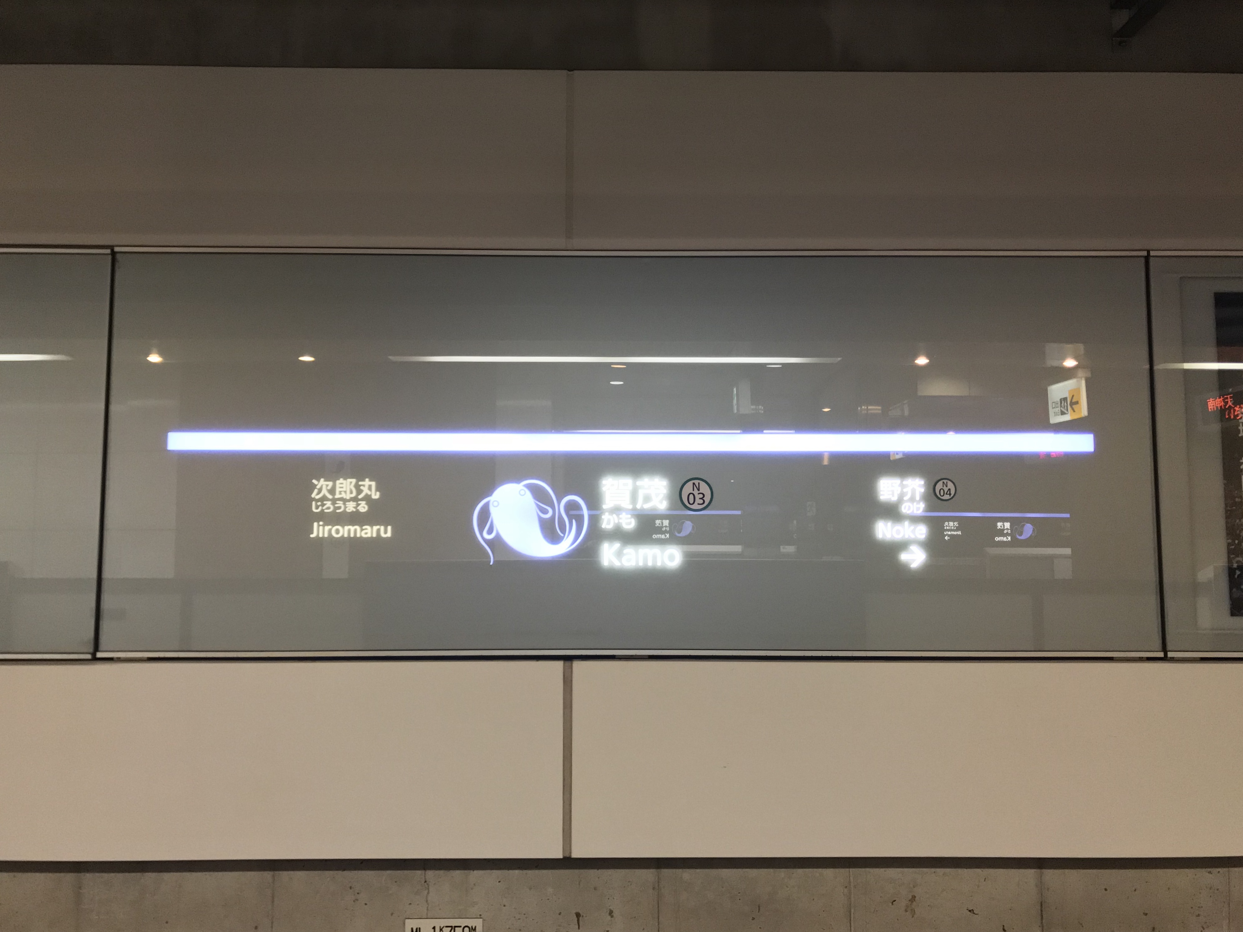 賀茂駅の駅名標。イラストはナマズ